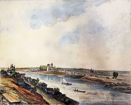 Беларуская (тарашкевіца): Полацак (Połacak), вуліца Вялікая (vulica Vialikaja), Дзьвіна і Задзьвіньне